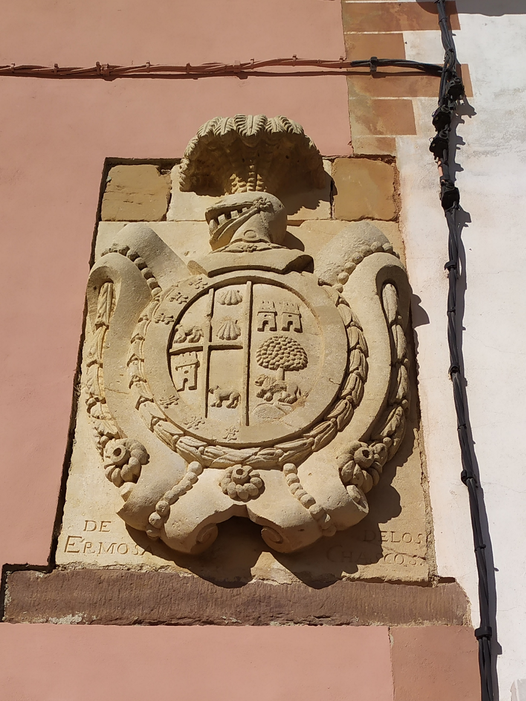 Escudo del siglo XIX con yelmo por timbre. Es partido, de una parte contracuartelado con orla de lises sucediéndose un animal pasante, dos veneras, un castillo y animal pasante; por el otro lado lleva árbol y animal pasante más dos castillos en la parte superior. Sus leyendas rezan respectivamente DE ERMOSA y DE LOS CHASCOS.